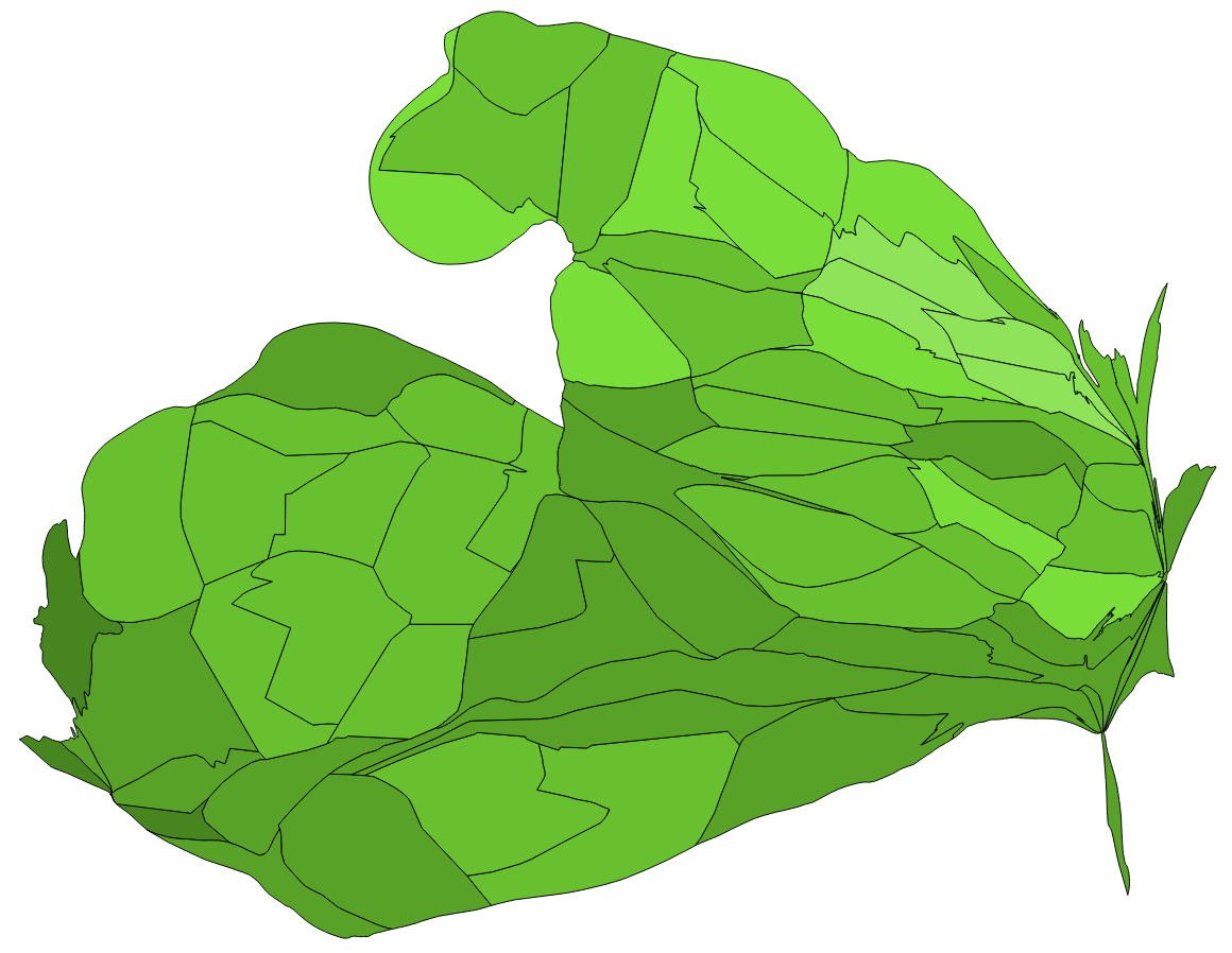 顏色對照表